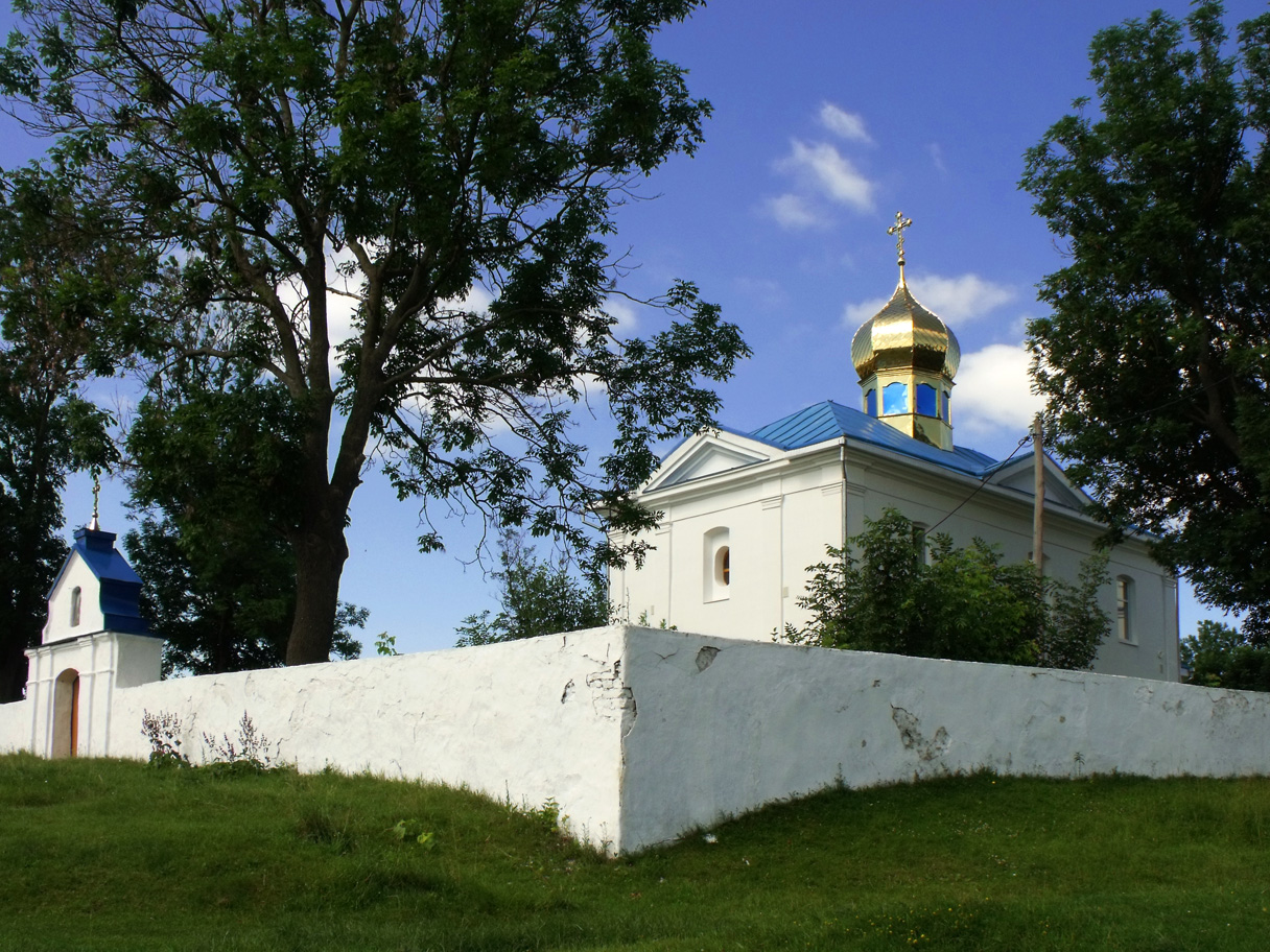 Комплекс споруд церкви Різдва Богородиці, Журавне, вул. Надії Курченко